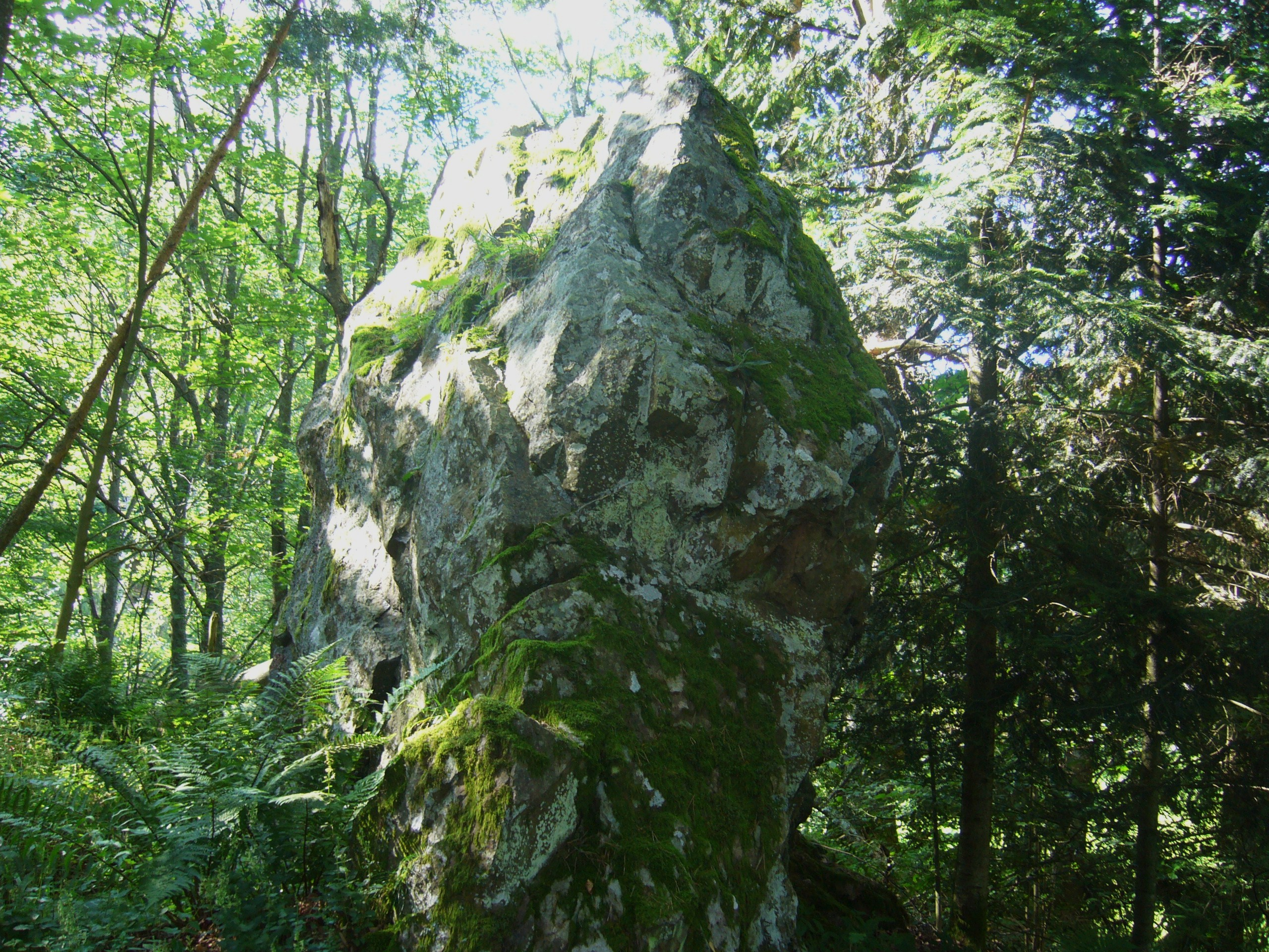 Rocher de la Longire à Rombach-le-Franc où le curé Boulanger disait sa messe au cours de la Révolution